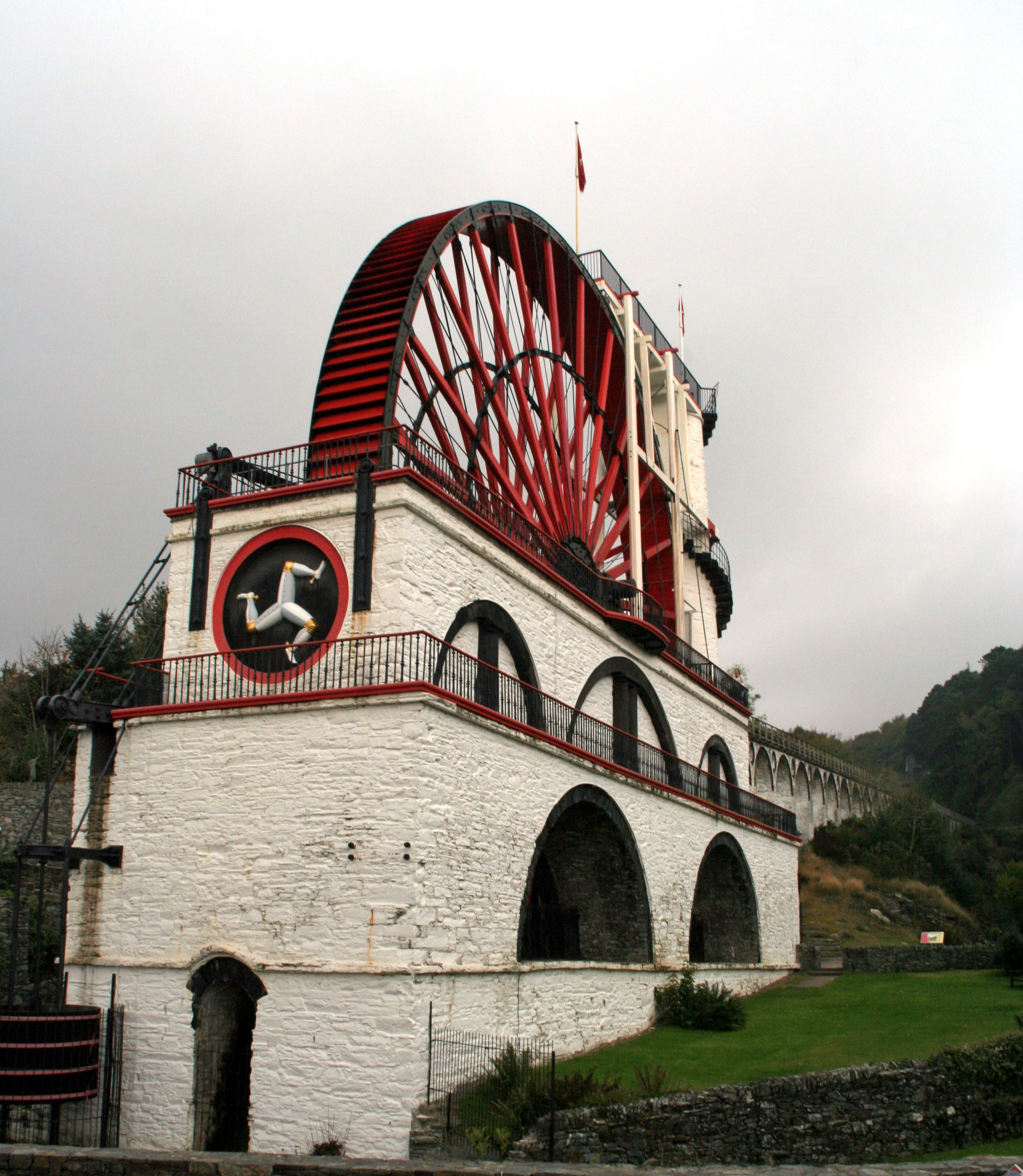 Laxey Wheel